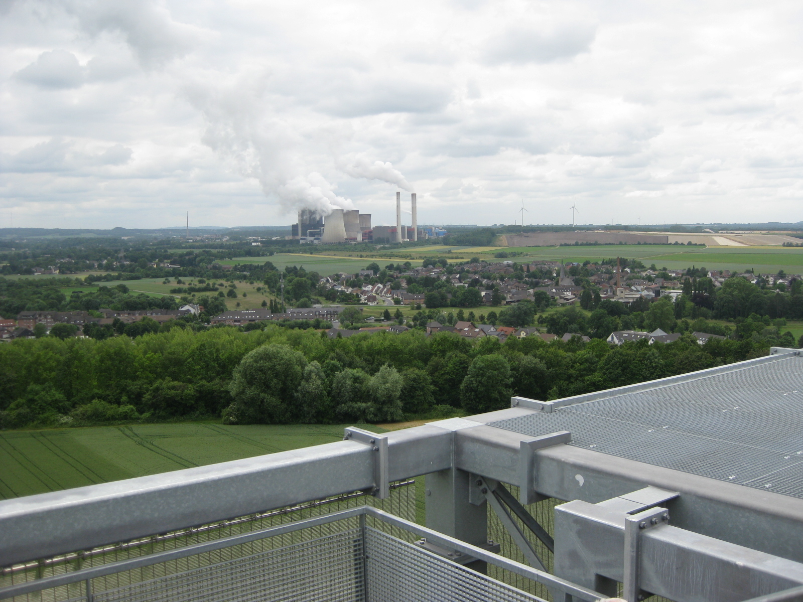 Vom Indemann auf der Goltsteinkuppe im westlichen Kreis Düren aus gesehen: Inden/Altdorf, Lamersdorf, Kraftwerk Weisweiler sowie am Horizont linkerhand der Schwarze Berg